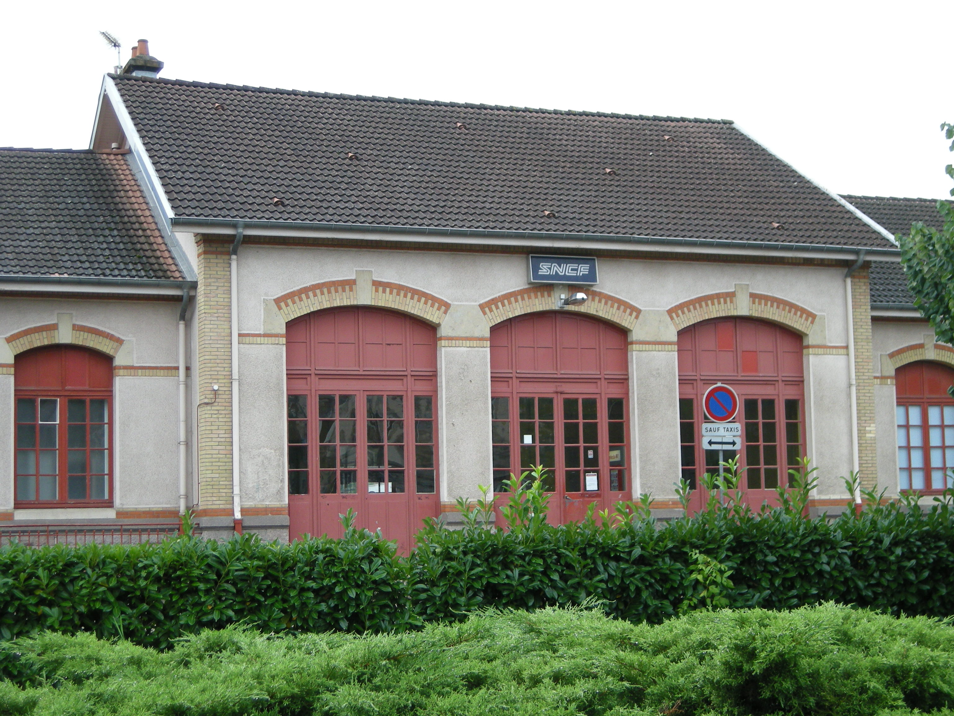 Gare de Raon-l'Etape, côté square, (Vosges, France)